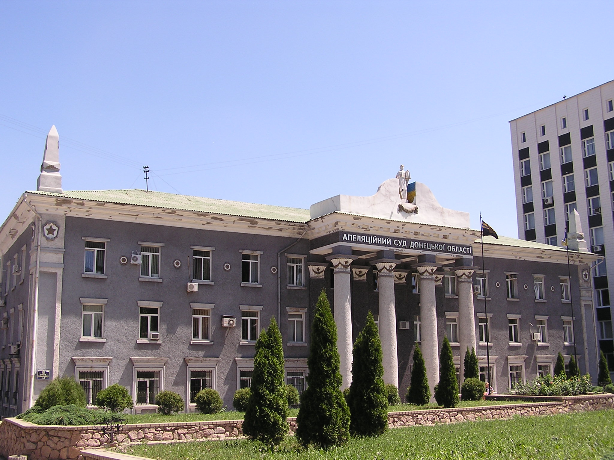 Донецк. Апелляционный суд донецкой области